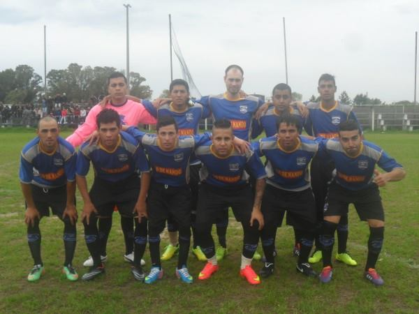 HALCONES F C